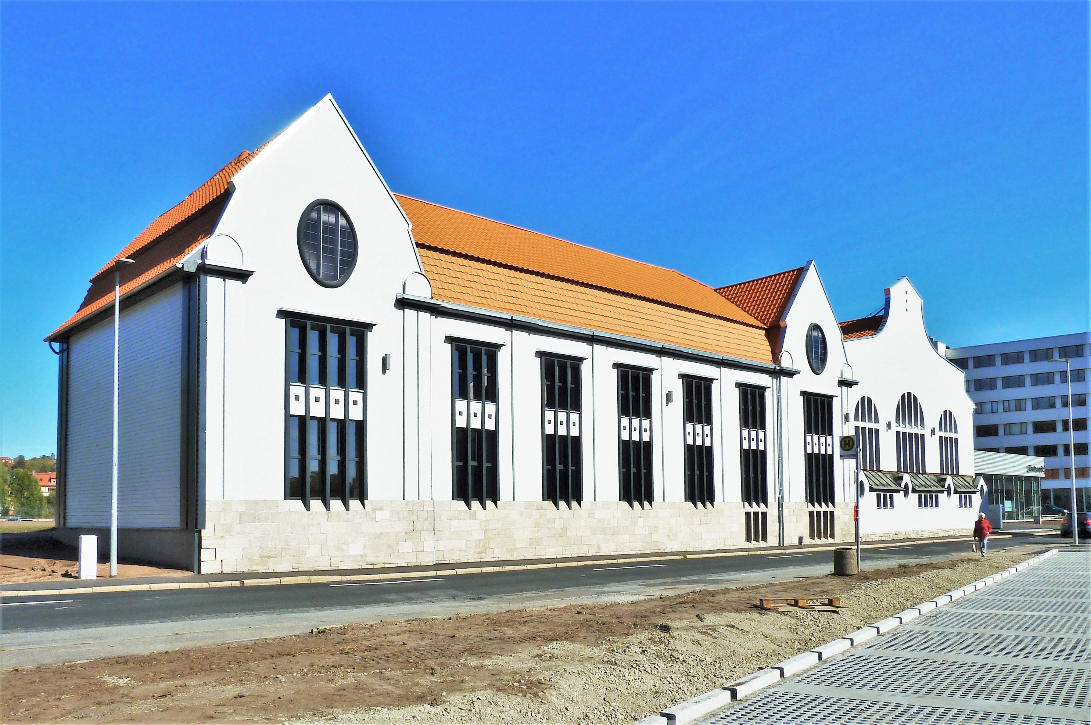 Ehemalige um 1910 im Jugendstil erbaute Firmengebäude der Stadtwerke Meiningen in der Landsberger Straße (heute Autohaus).